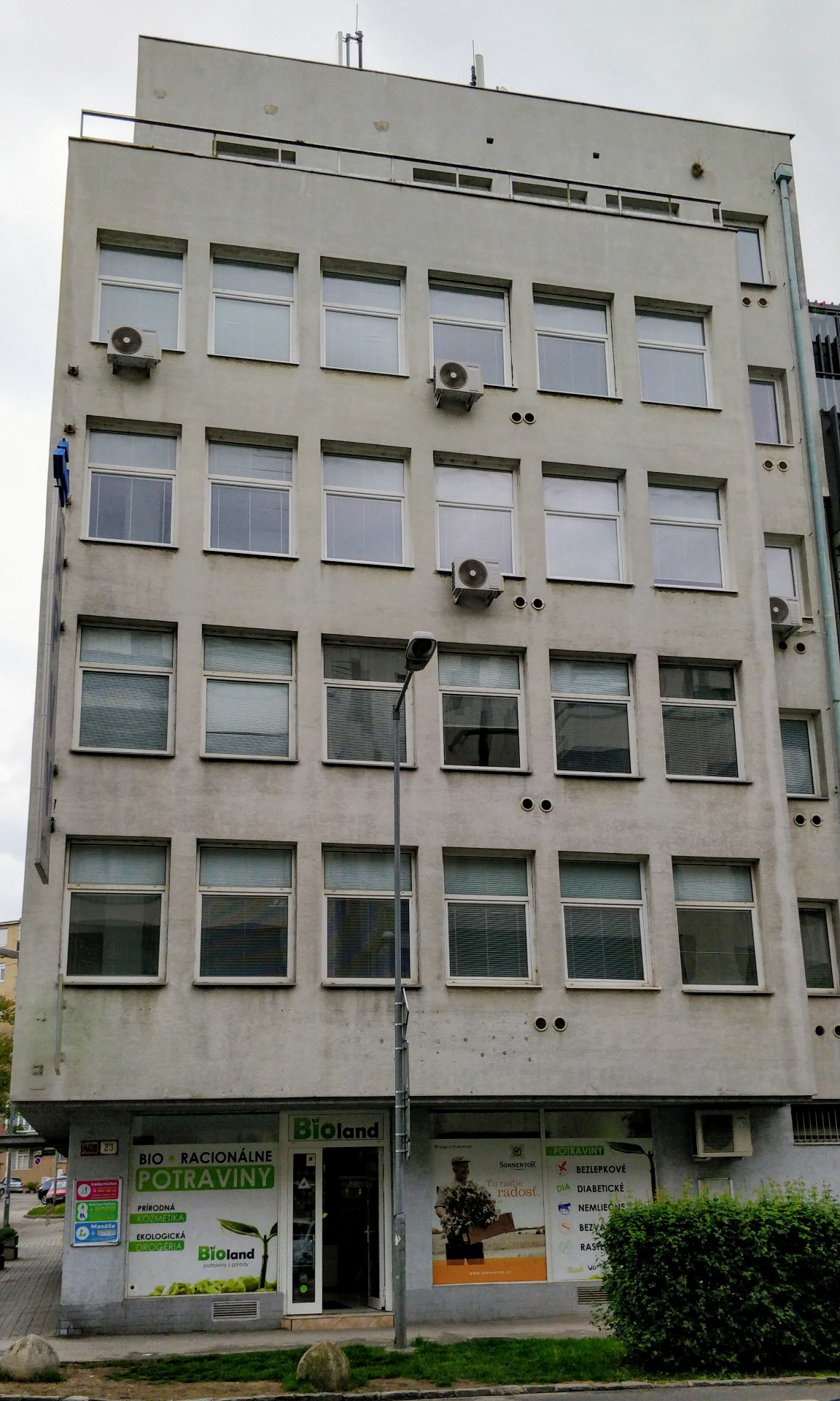 Mýtna 23, Bratislava, Slovakia